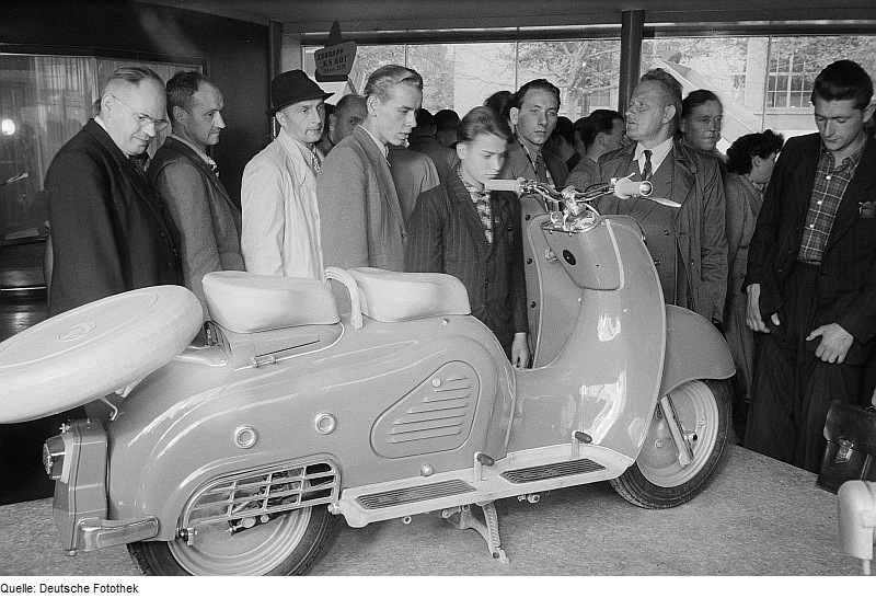 Original image description from the Deutsche FotothekBesucher der Leipziger Herbstmesse 1954 betrachten eine Bella mit Ersatzrad der Firma Zündapp